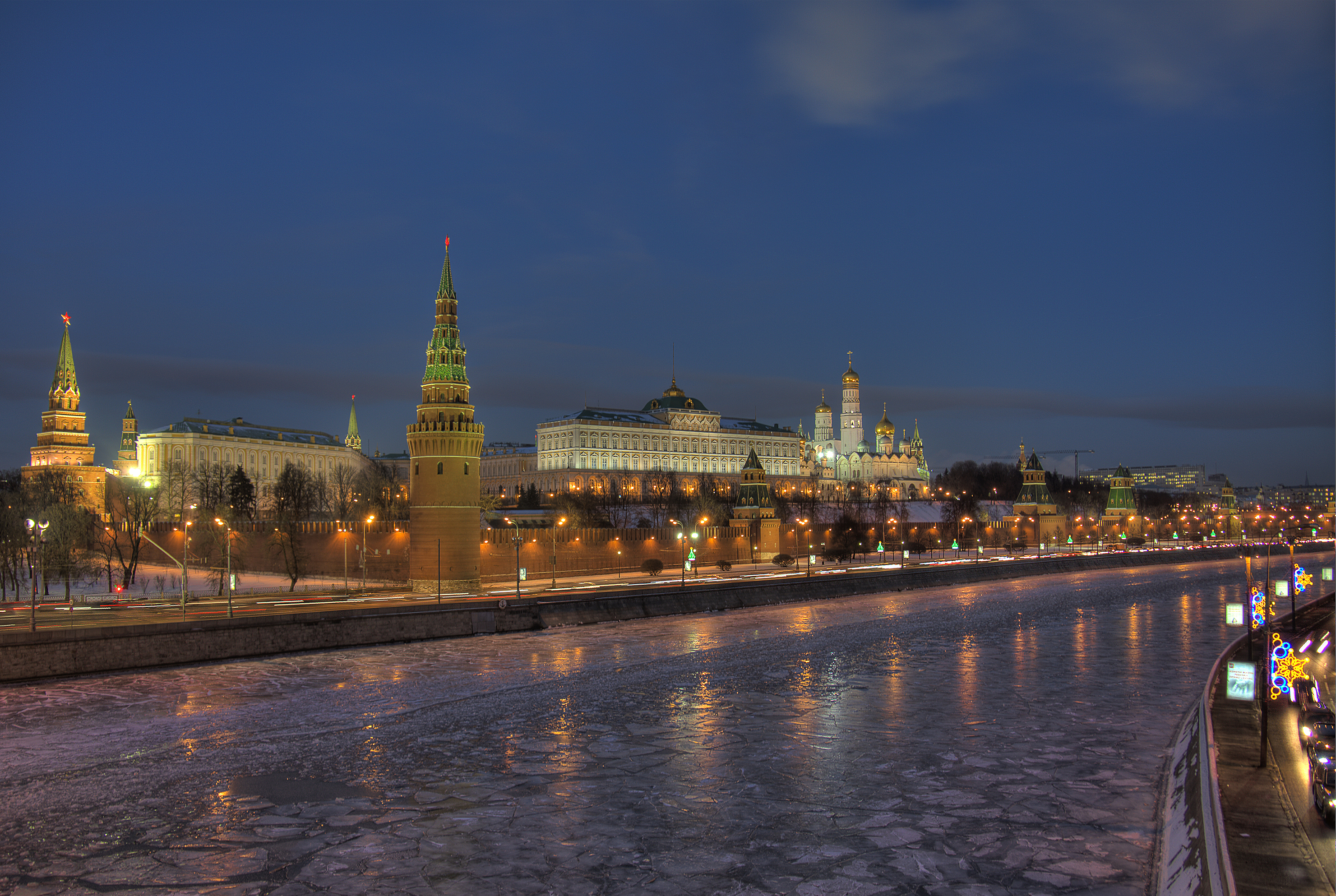 Moscow Kremlin, Moscow river at winter evening Москокий кремль, река Москва. Зимняя ночь.